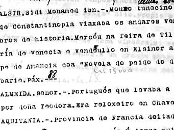 Fragmento mecanografado de Merlín e familia